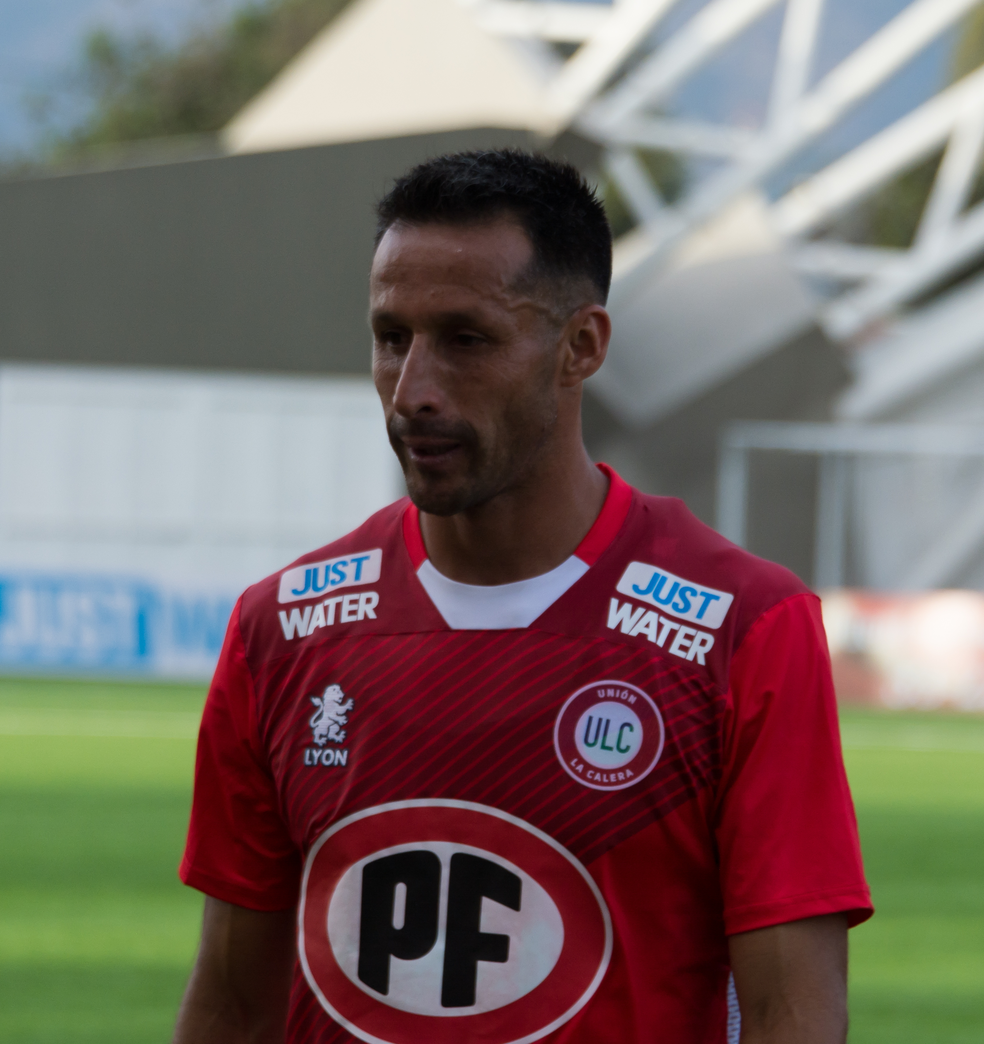 Christian Vilches, Unión La Calera v Colo-Colo, Estadio Municipal Nicolás Chahúan Nazar, La Calera, Región de Valparaíso, Chile.